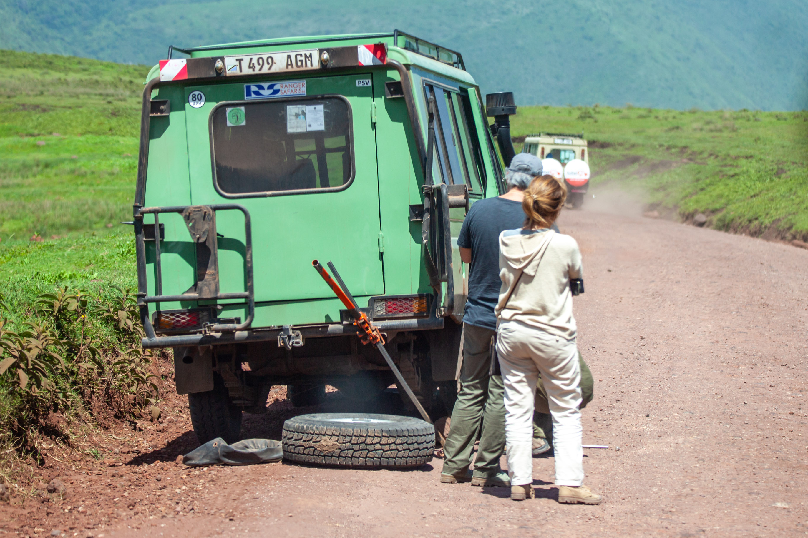 Les pistes africaines sont une épreuve pour les pneus les plus endurcis. This is an image with the theme "Africa on the Move or Transport" from: Tanzania